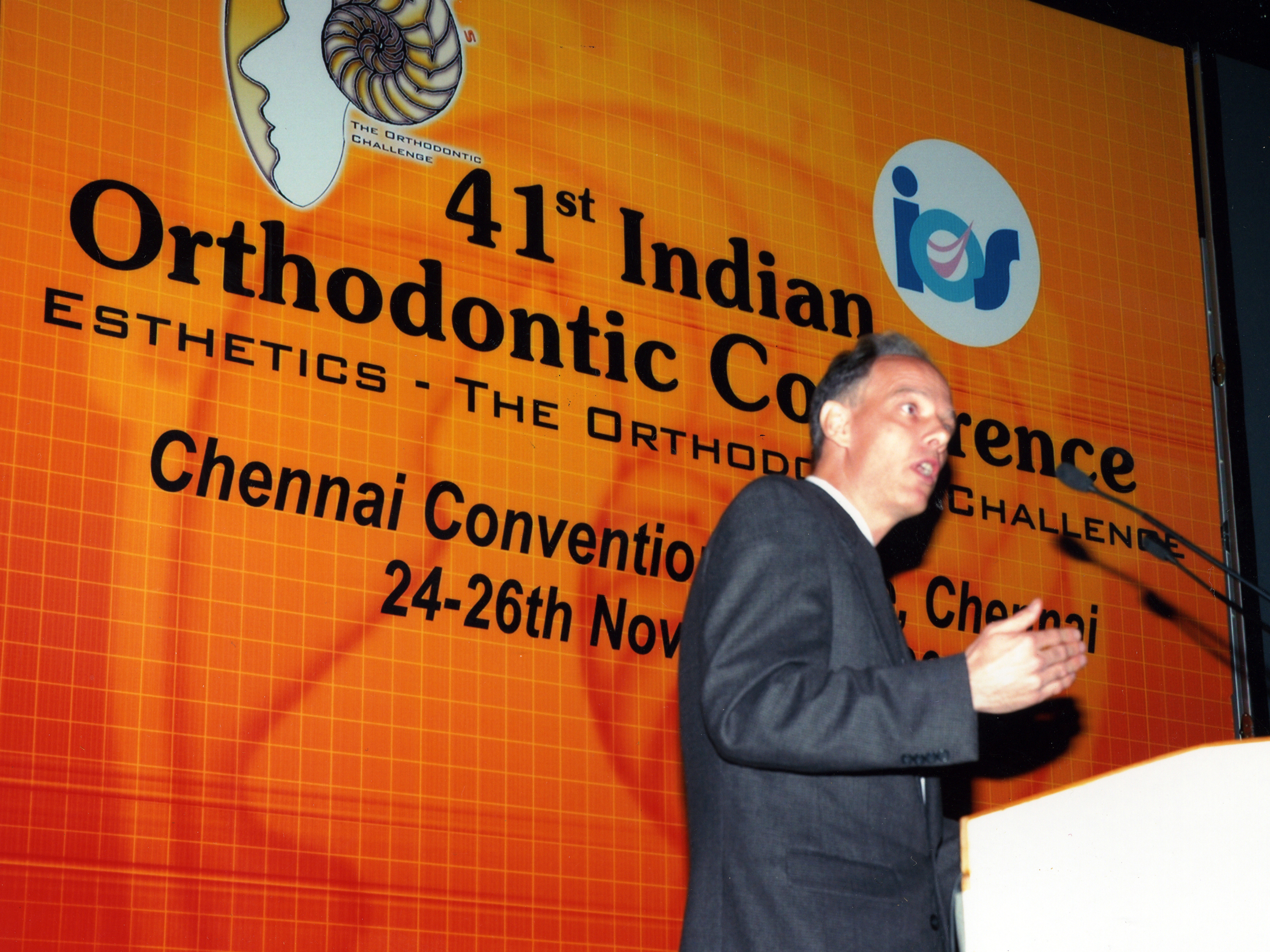 Dr. Simonas Žmuidzinas skaito mokslinę pąskaitą.